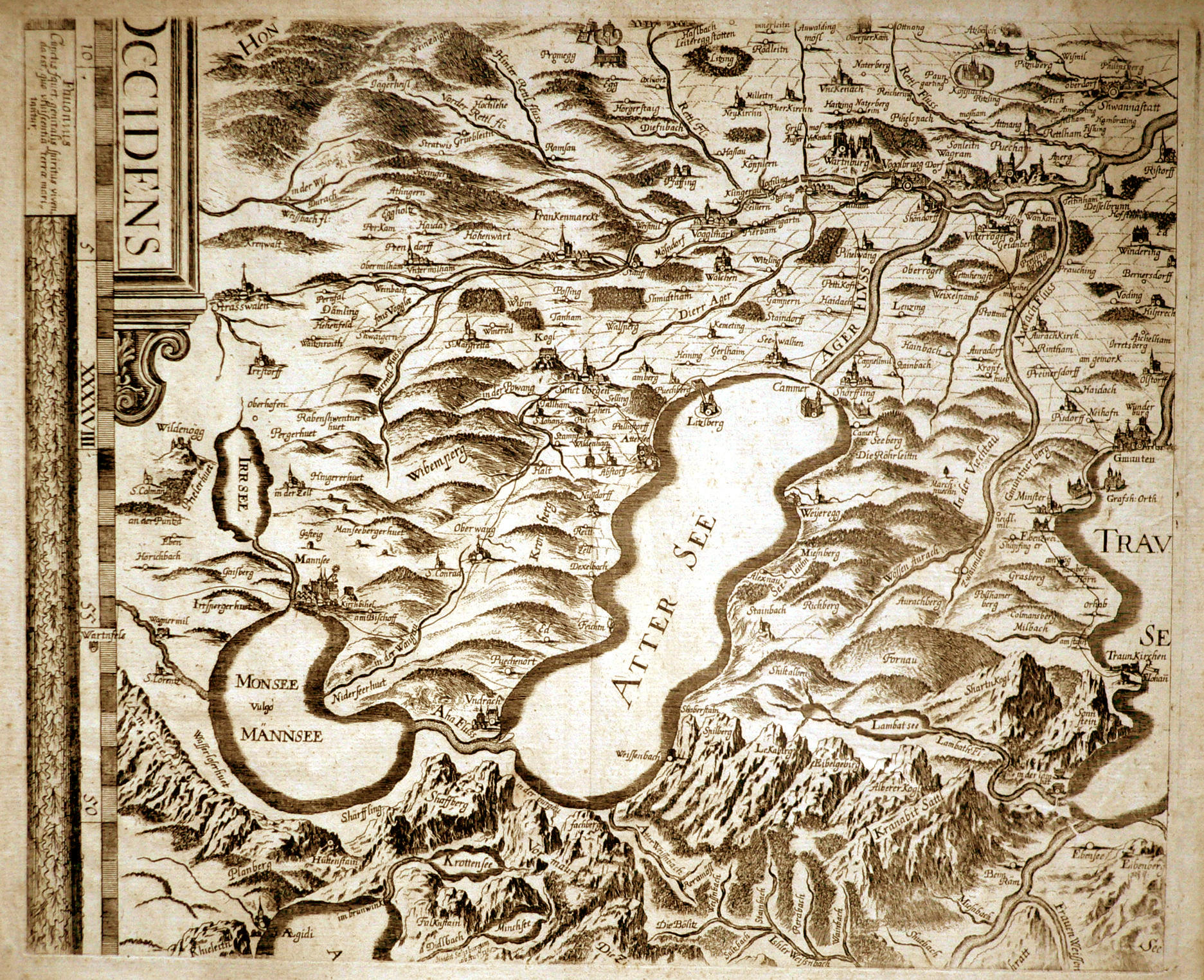 Attersee-Kupferstich-1672